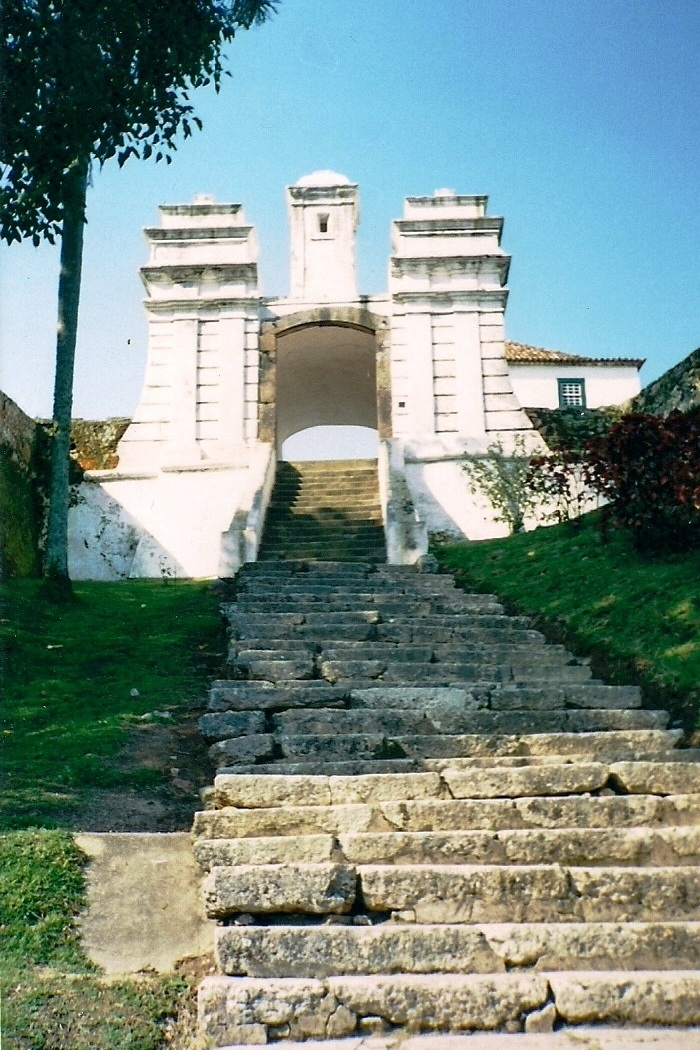 Fortaleza de Santa Cruz de Anhatomirim, ilha de Anhatomirim, SC, Brasil: aspecto do Portão de Armas.